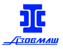 map